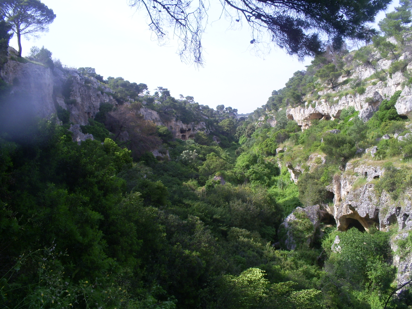 Gravina presente nel territorio di Mottola (Taranto)